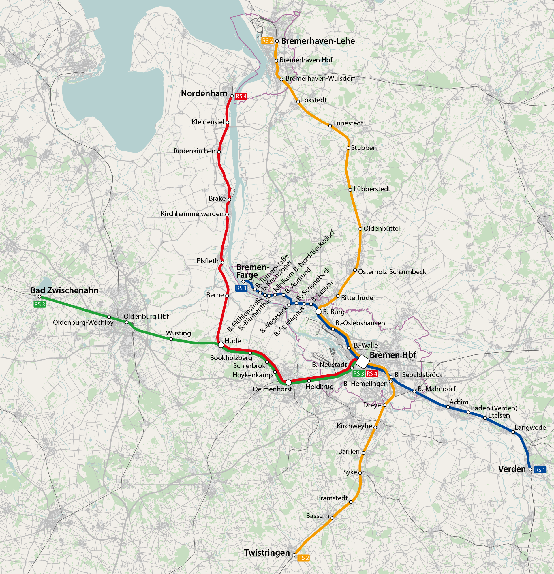 Karte der Regio-S-Bahn Bremen/Niedersachsen, Stand 2015